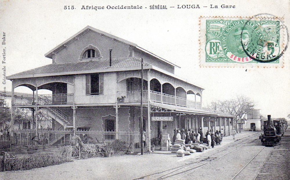 La gare de Louga